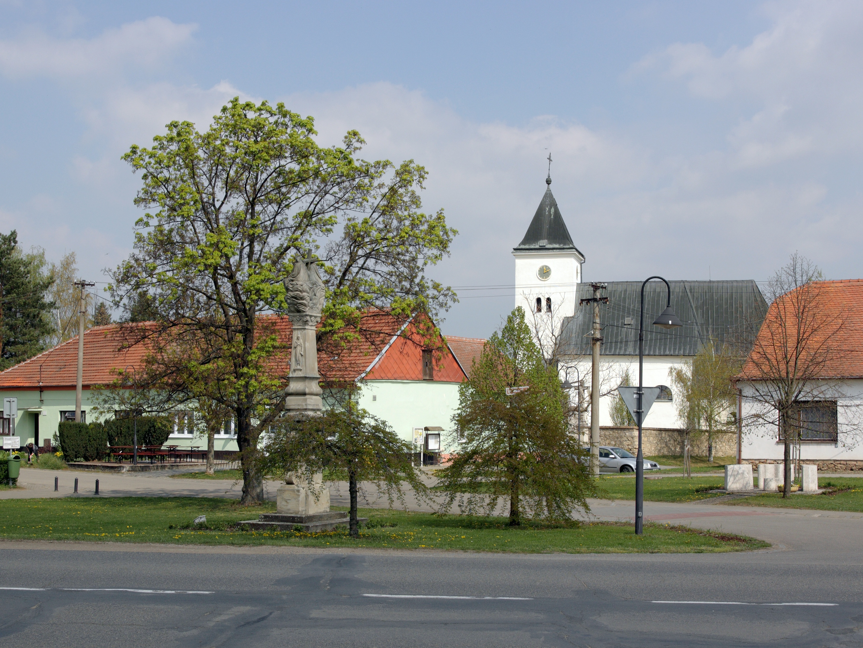 Žatčany - náves se sloupem Nejsvětější trojice, v pozadí hospoda a kostel.